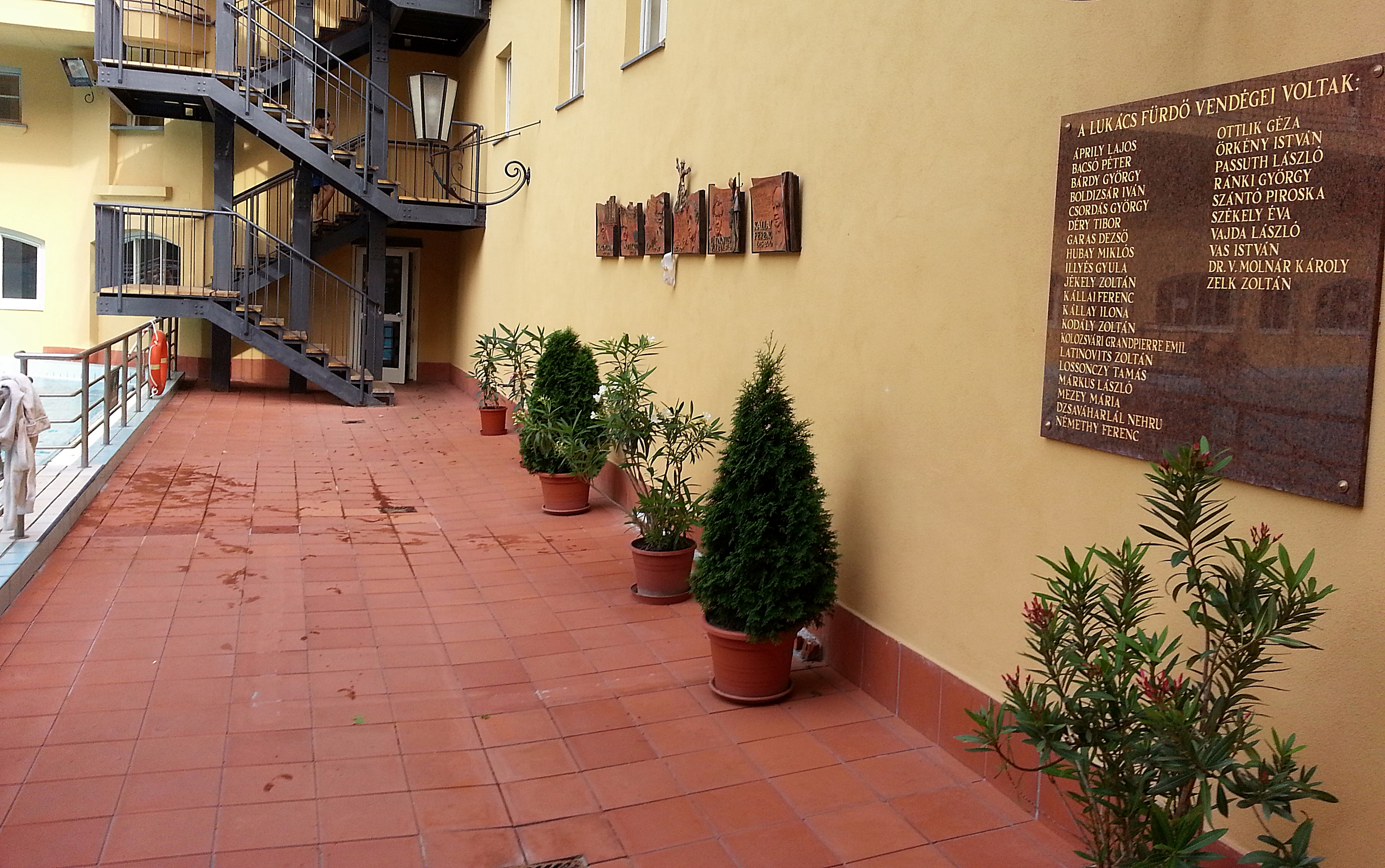 A Szent Lukács Gyógyfürdő híres vendégeinek emlékfala